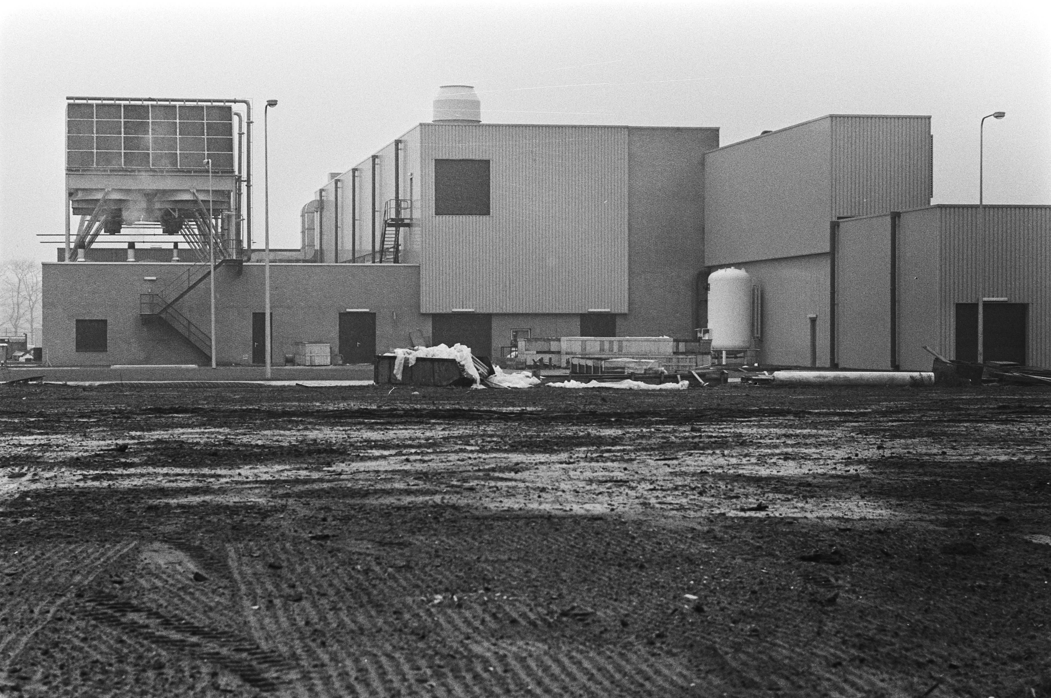 Demonstratie tegen uitbreiding UCN in Almelo; gebouwen UCN Almelo